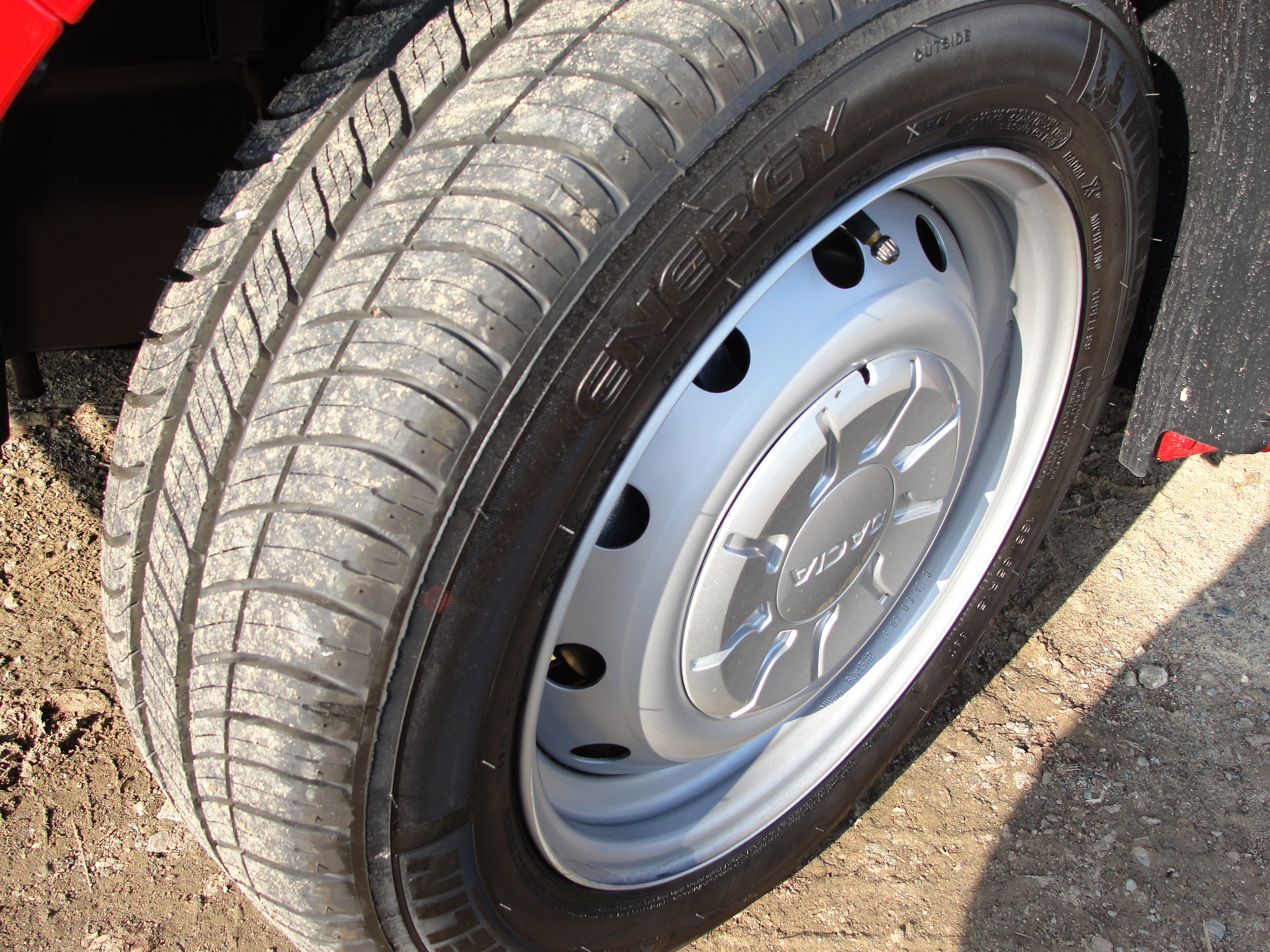 Véhicule à bas prix, ne signifie pas voiture au rabais. Même en version d'appel, la Sandero est montée en pneus de 185 sur jantes 15".